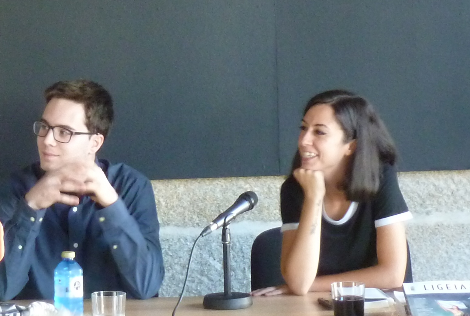 Marcus Daniel Cabada e Tamara Andrés presentando a revista Ligeia en Bueu o 22/09/2018